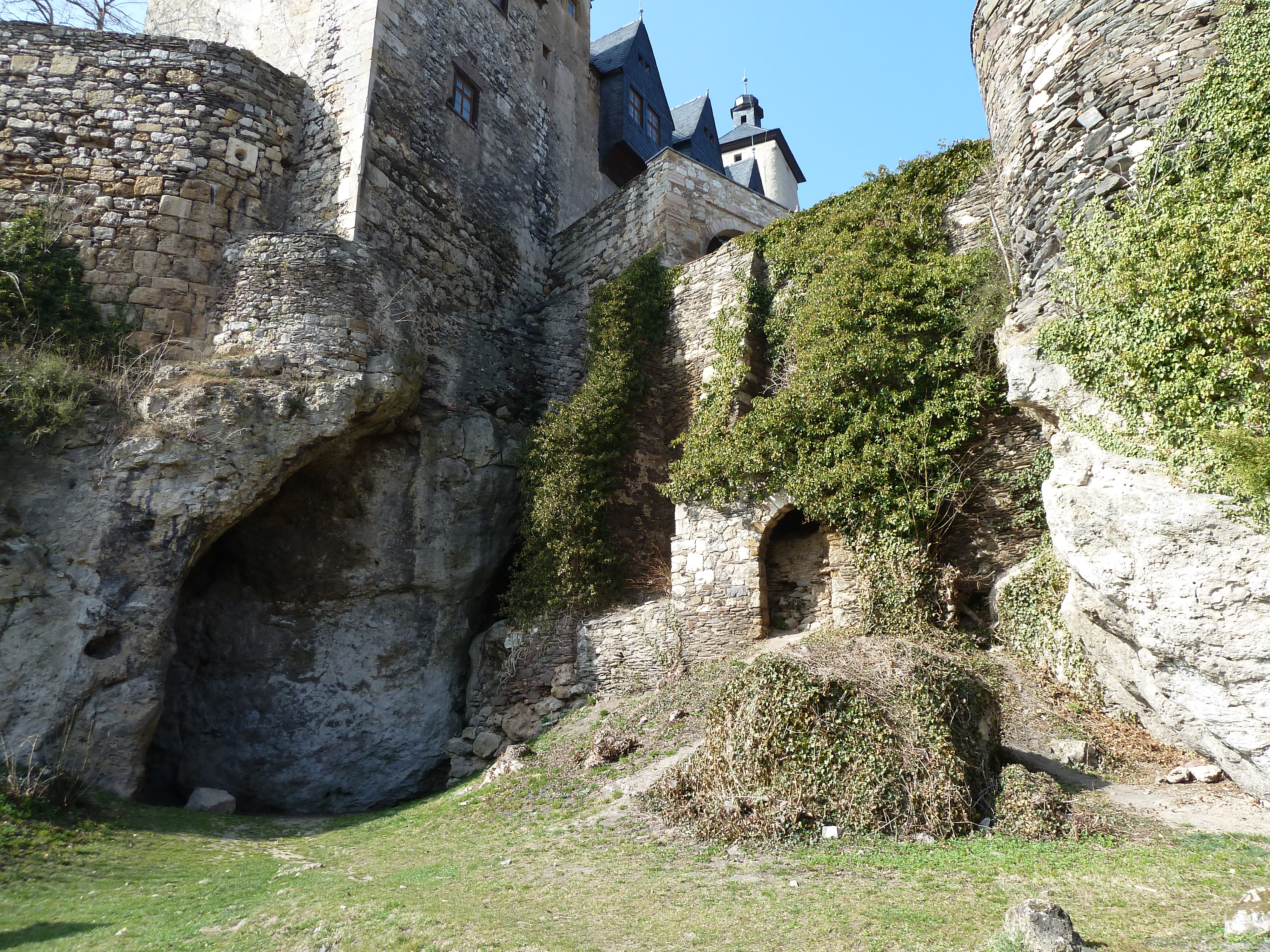 Ilsenhöhle: Areal der Vorhalle Am rechten Bildrand befindet sich der Ansatzbereich der eingestürzten Überwölbung.